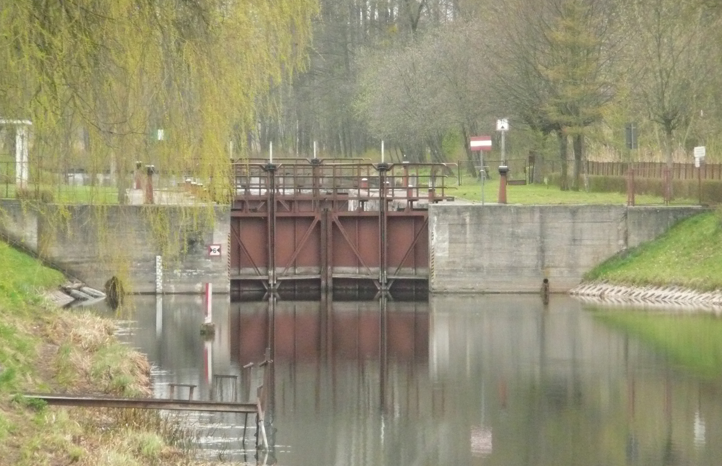 Śluza w Białobrzegach - widok na dolne wrota